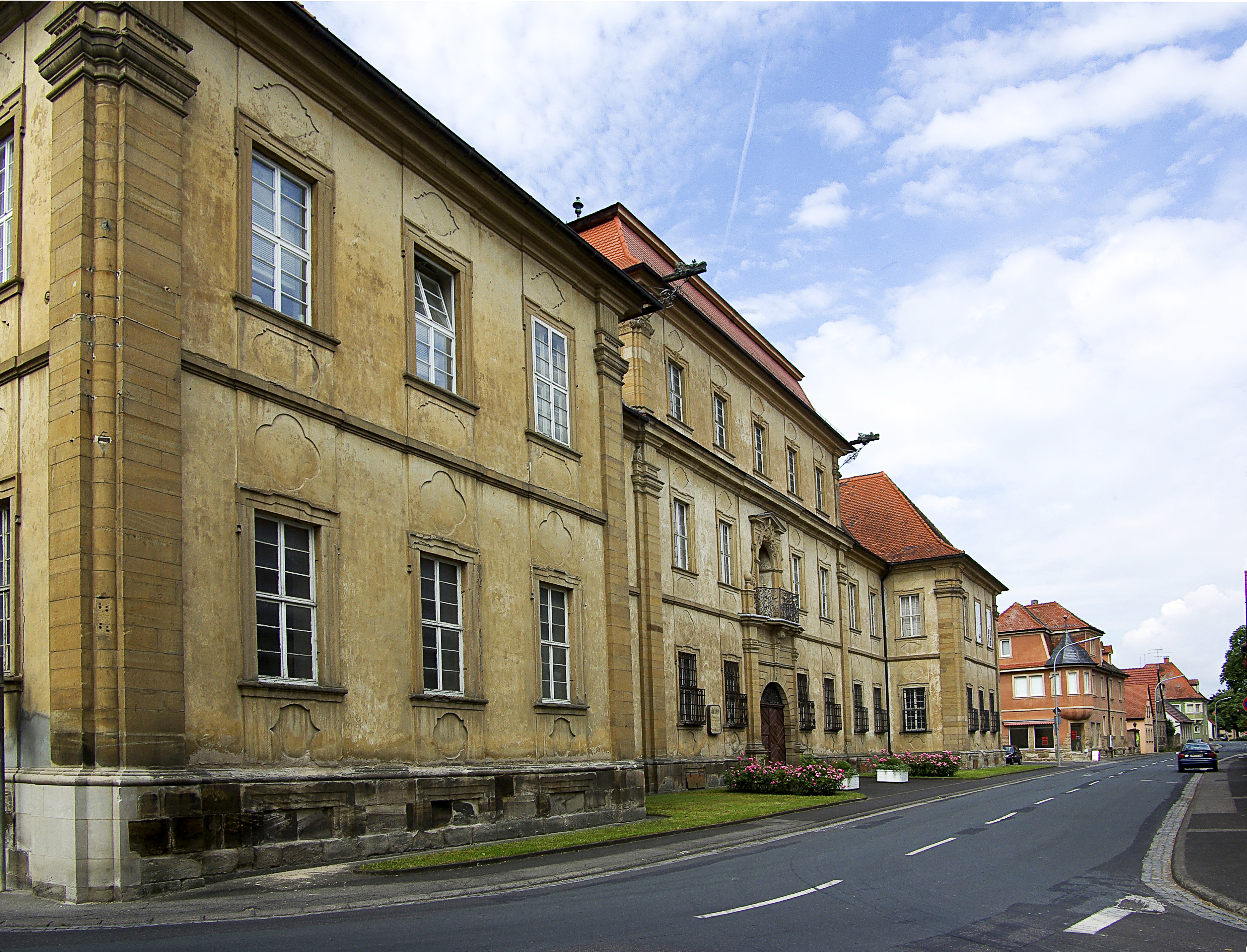 Ehemalige Ebracher Amtsvogtei (Amtsschloss); Wilhelm-Behr-Straße 34 in Sulzheim / Unterfranken